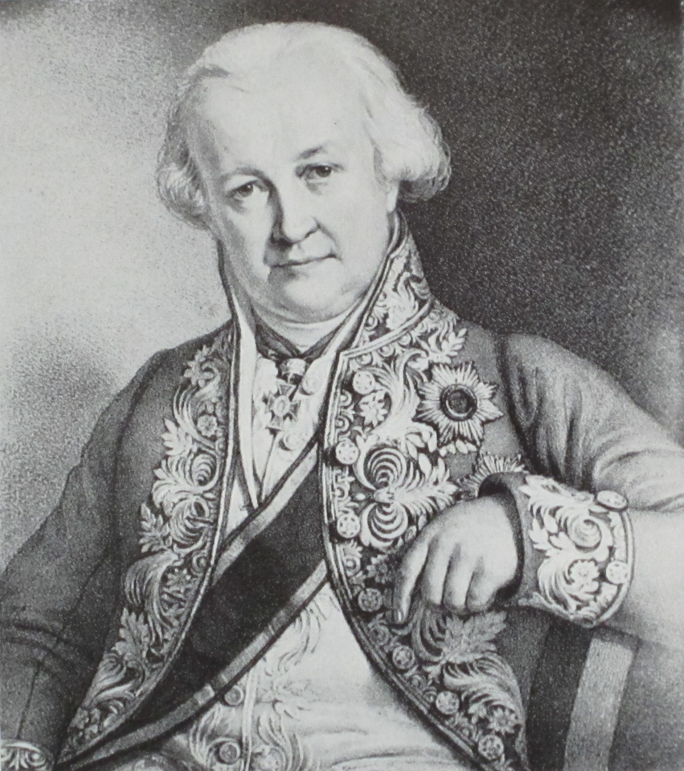 Bildnis Johann von Türckheim (1749–1824)